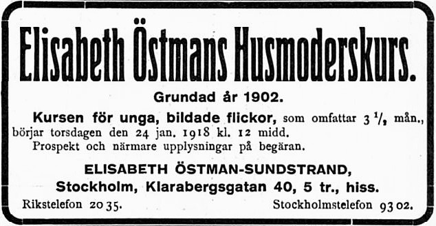 Elisabeth Östmans husmoderskurs annons i tidskriften IDUN 1918.